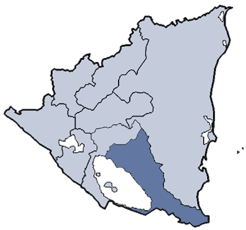 Mappa della diocesi cattolica di Juigalpa, in Nicaragua. Lavoro personale eseguito a partire da questa immagine di Commons. Fonte per i confini delle diocesi: Categoria:Chiesa cattolica in Nicaragua